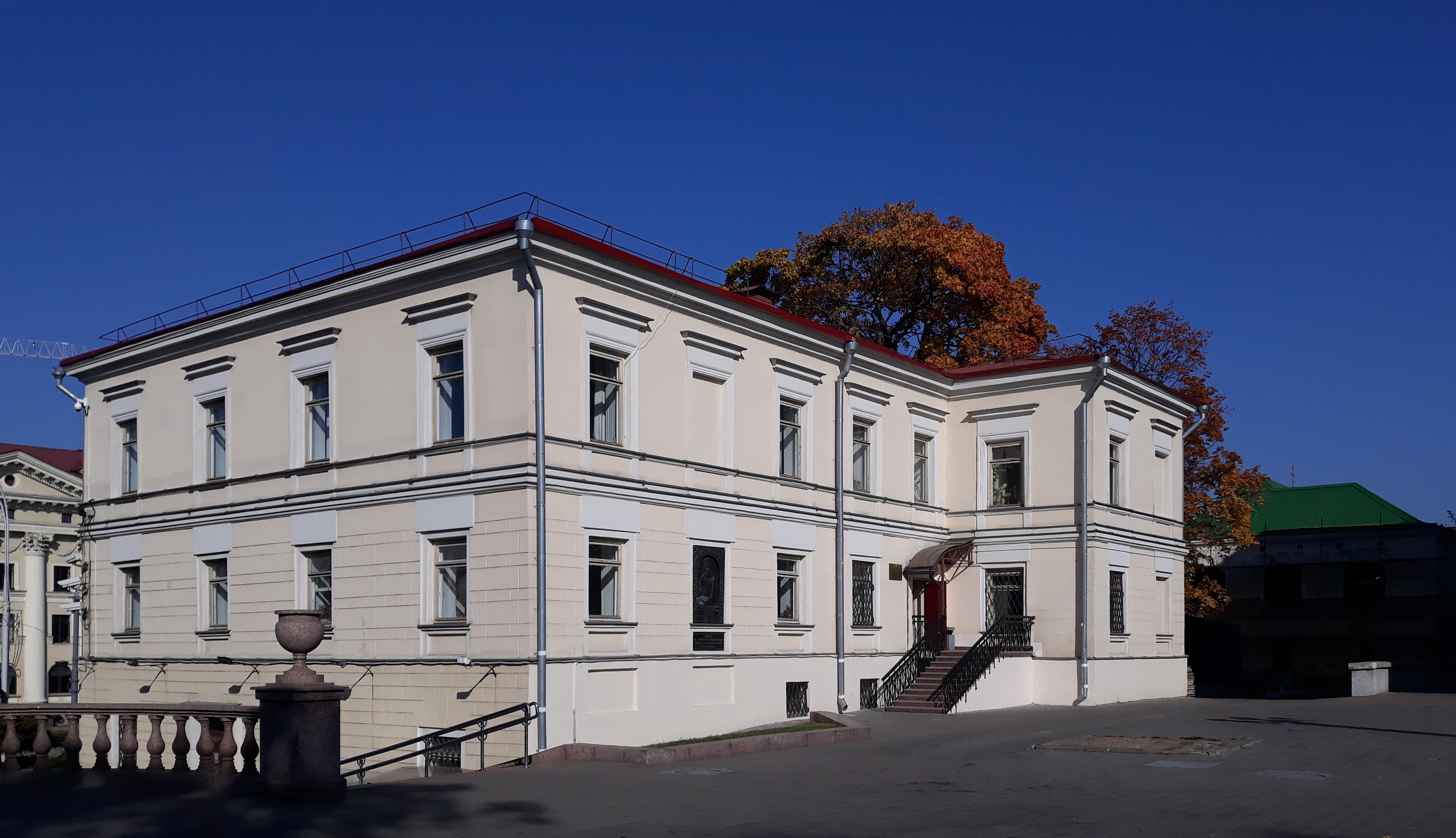 Інстытут тэалогіі імя святых Мяфодзія і Кірыла БДУ